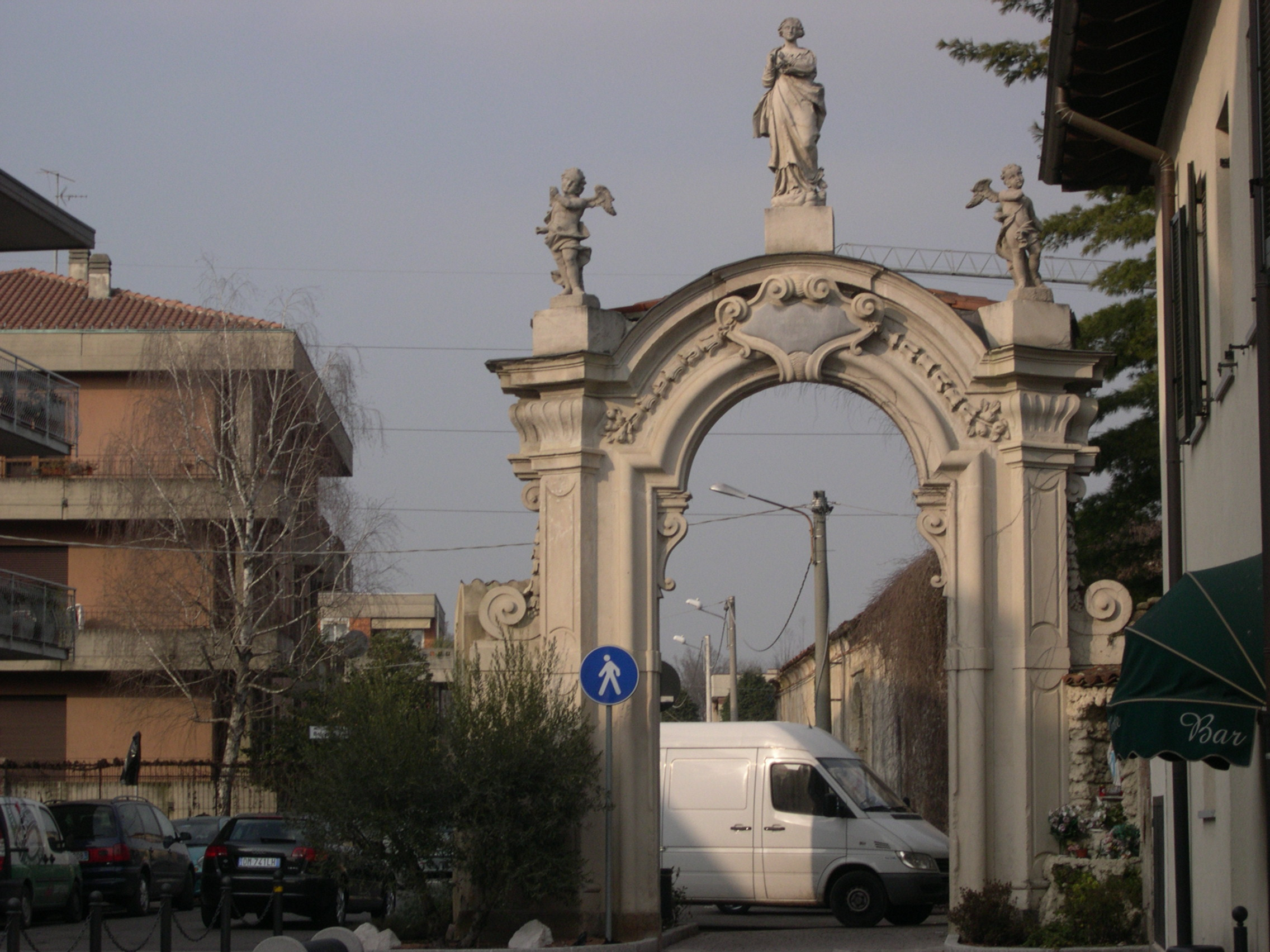 Arcodi Manigonda (1710) nei pressi del monastero di Cairate